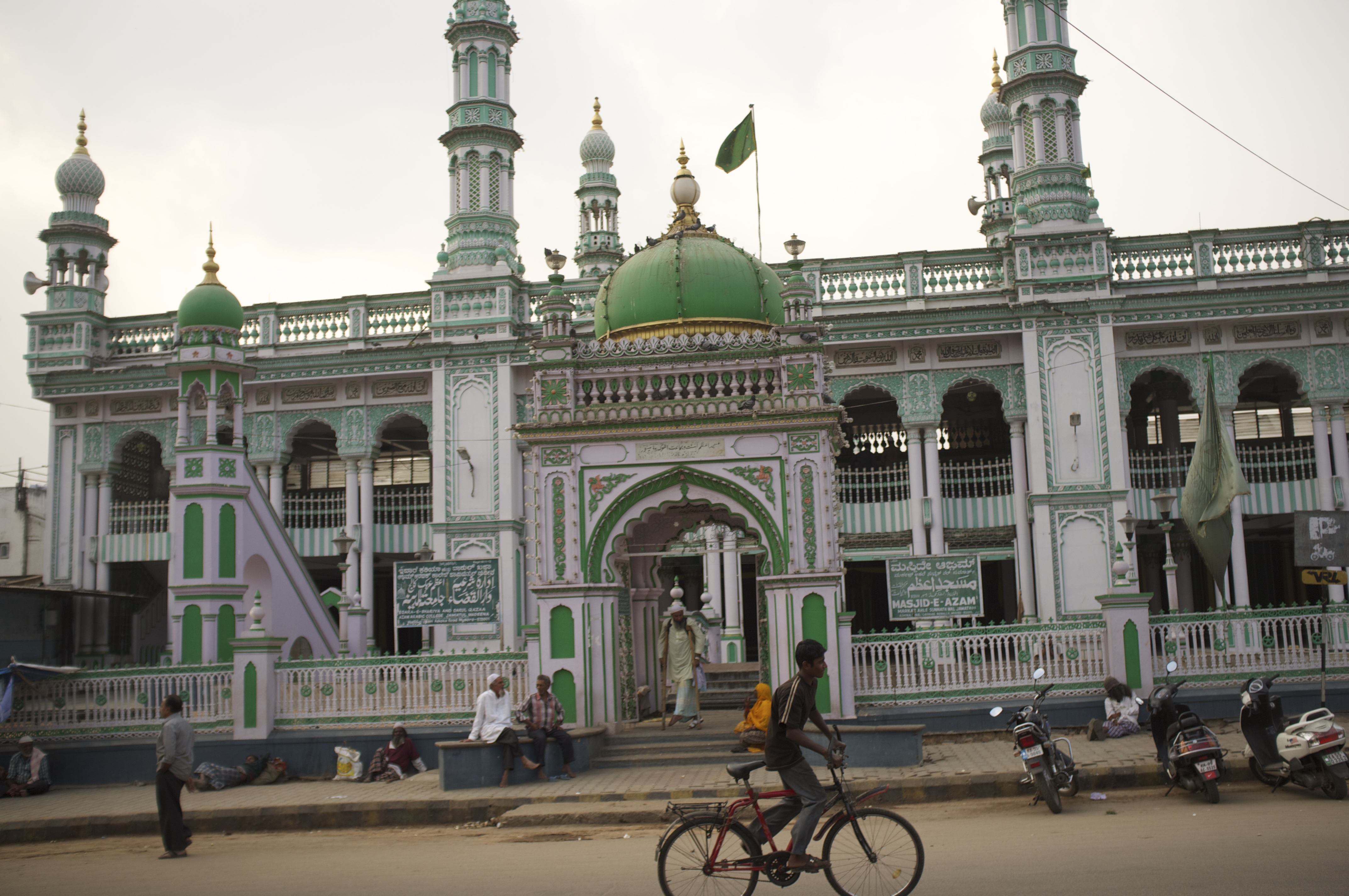 Azam Masjidh, Mandi Mohalla, Mysore, India